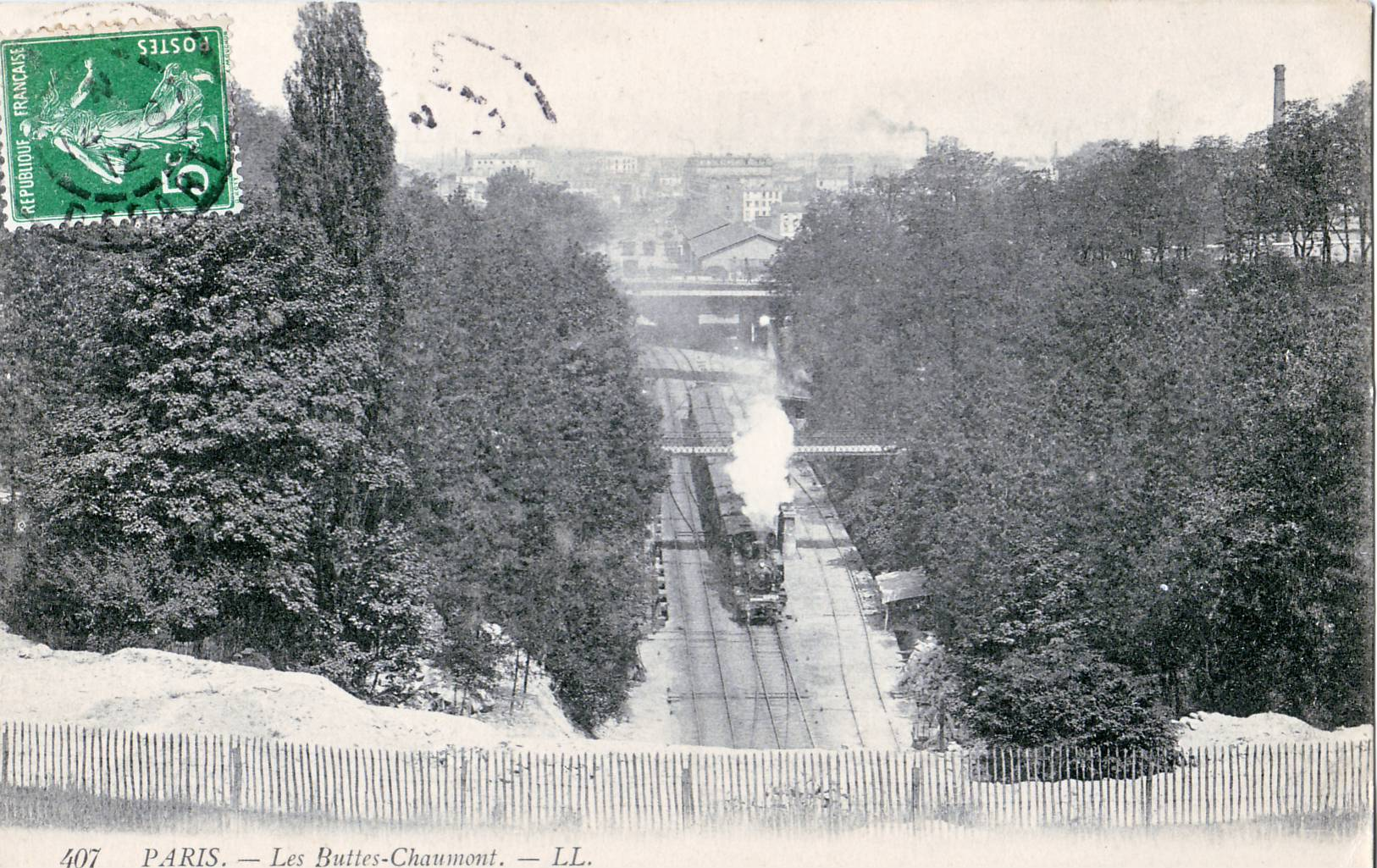 Carte postale ancienne éditée par LL, montrant la Petite Ceinture dans le Parc des Buttes-Chaumont